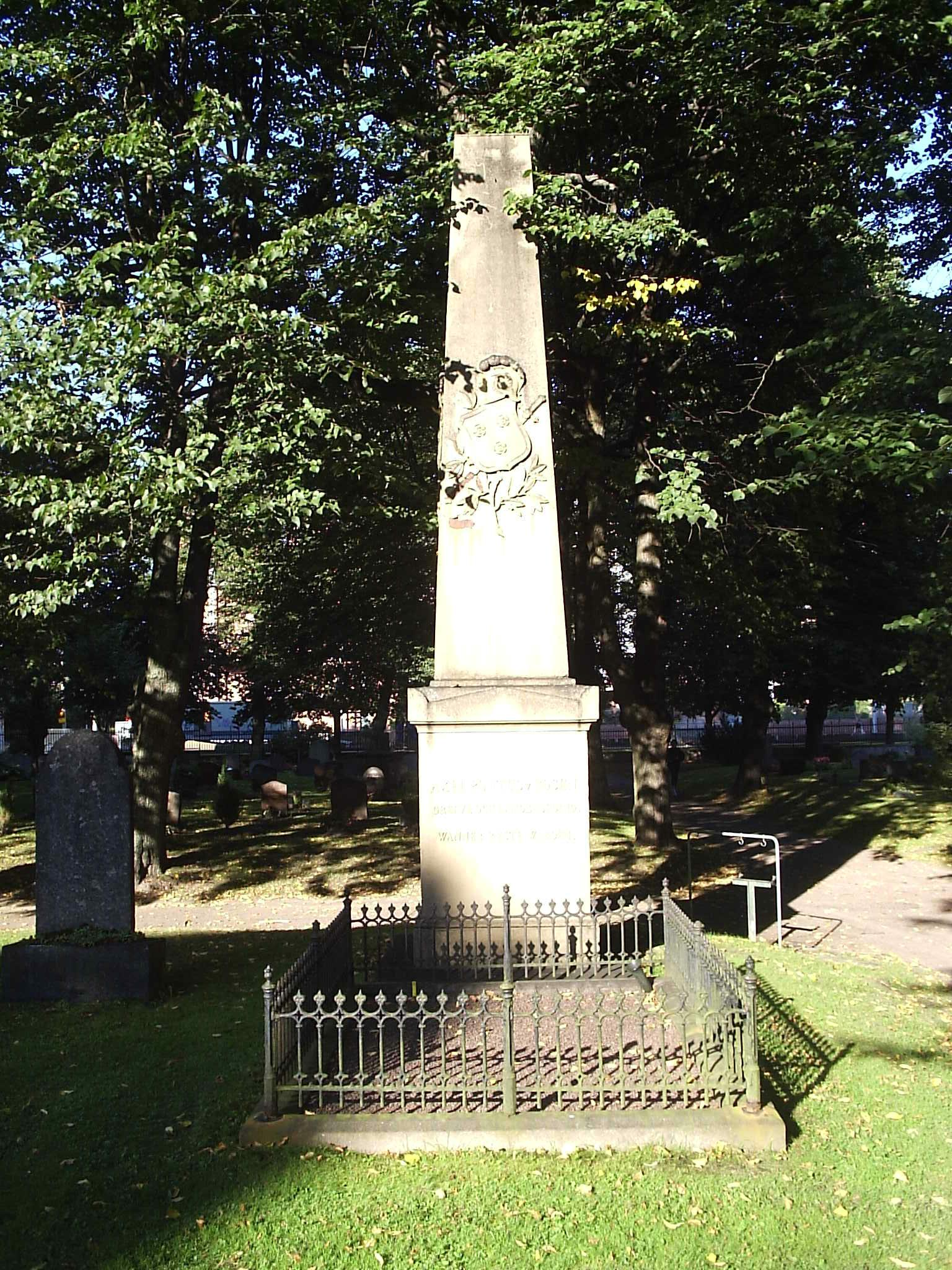 Bilden är fotograferad av Harri Blomberg. Photo by Harri Blomberg.